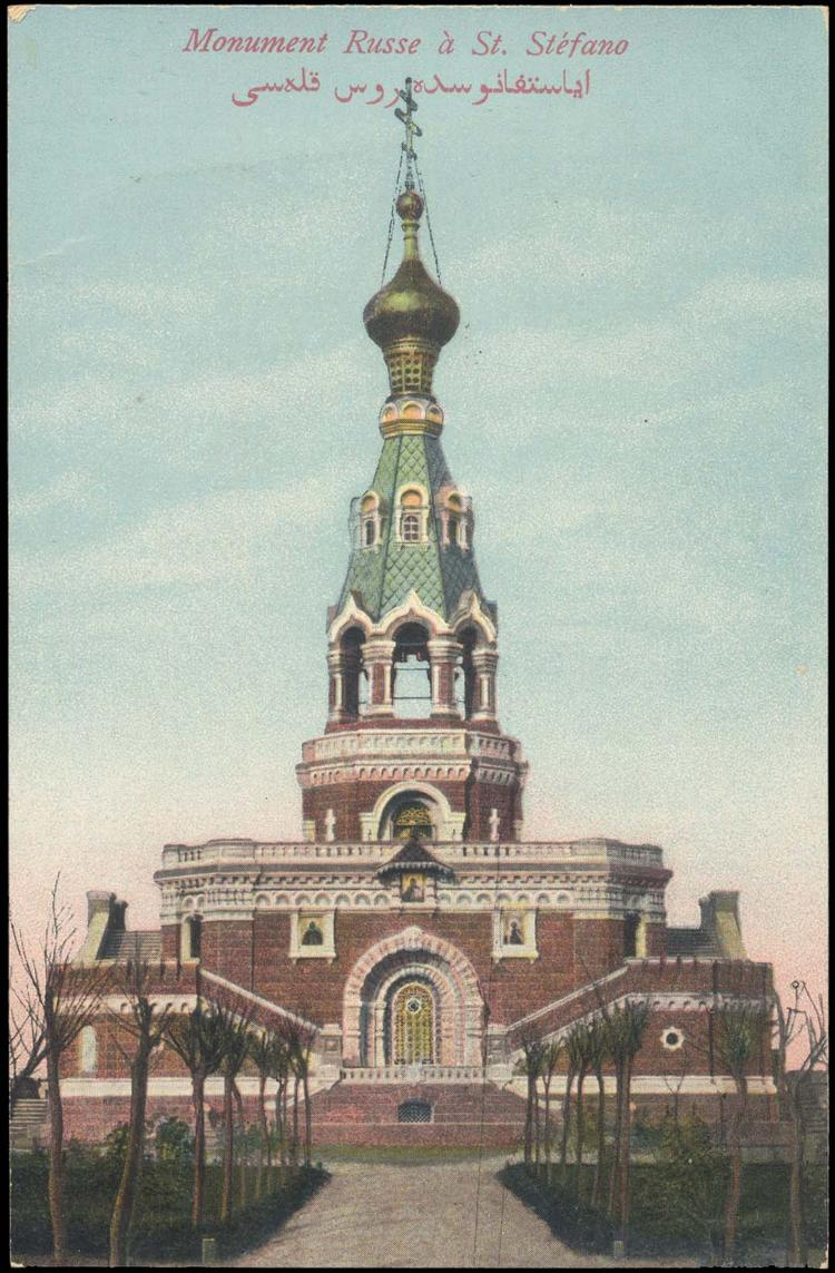 Руският монумент в Сан Стефано.